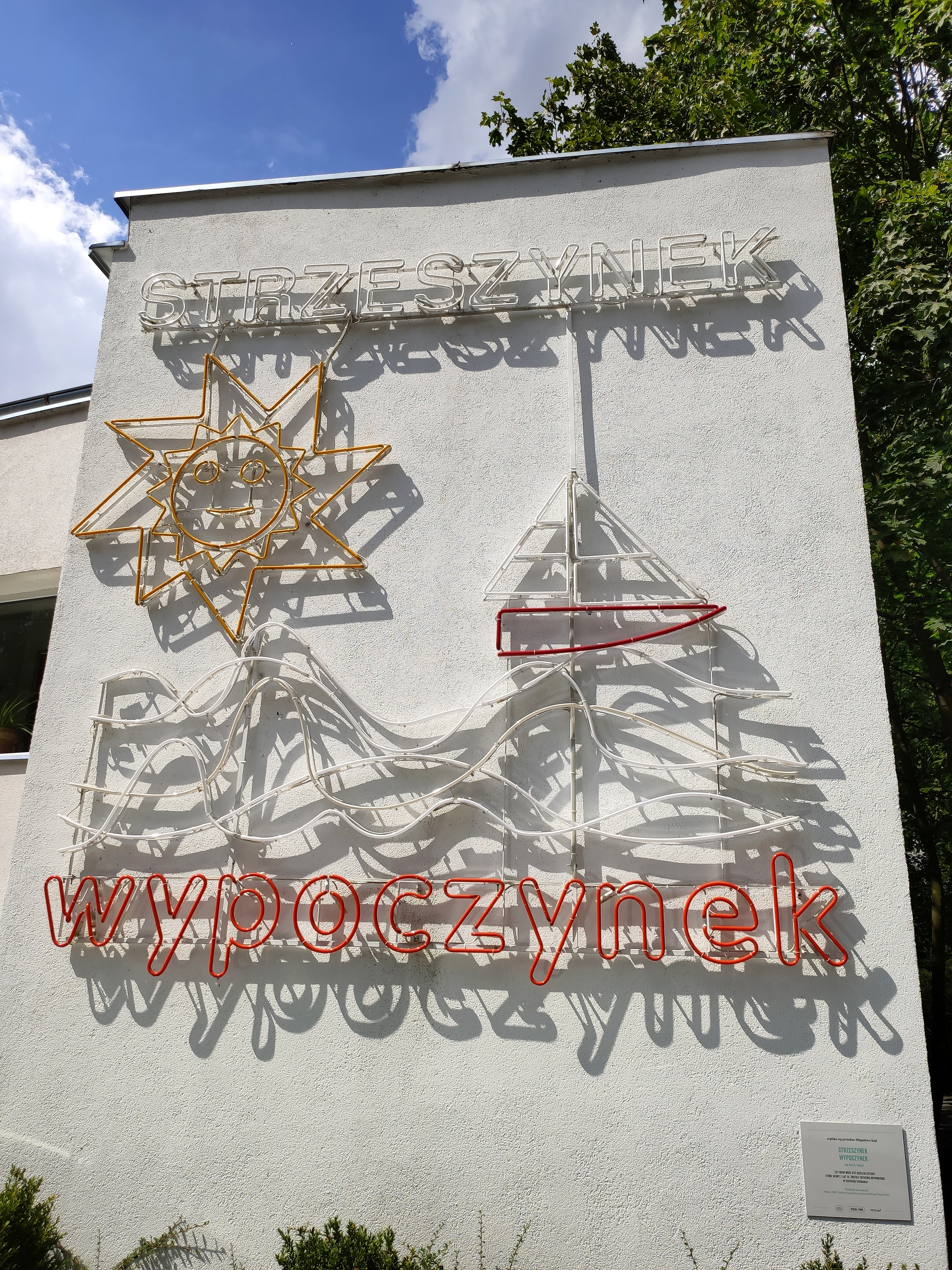 Strzeszynek wypoczynek - neon według projektu Zbigniewa Kaji (oryg. ok. 1975, na fotografii replika z roku 2019.)